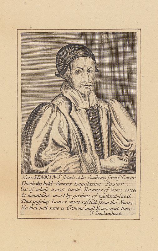 David Jenkins (1582-1663)